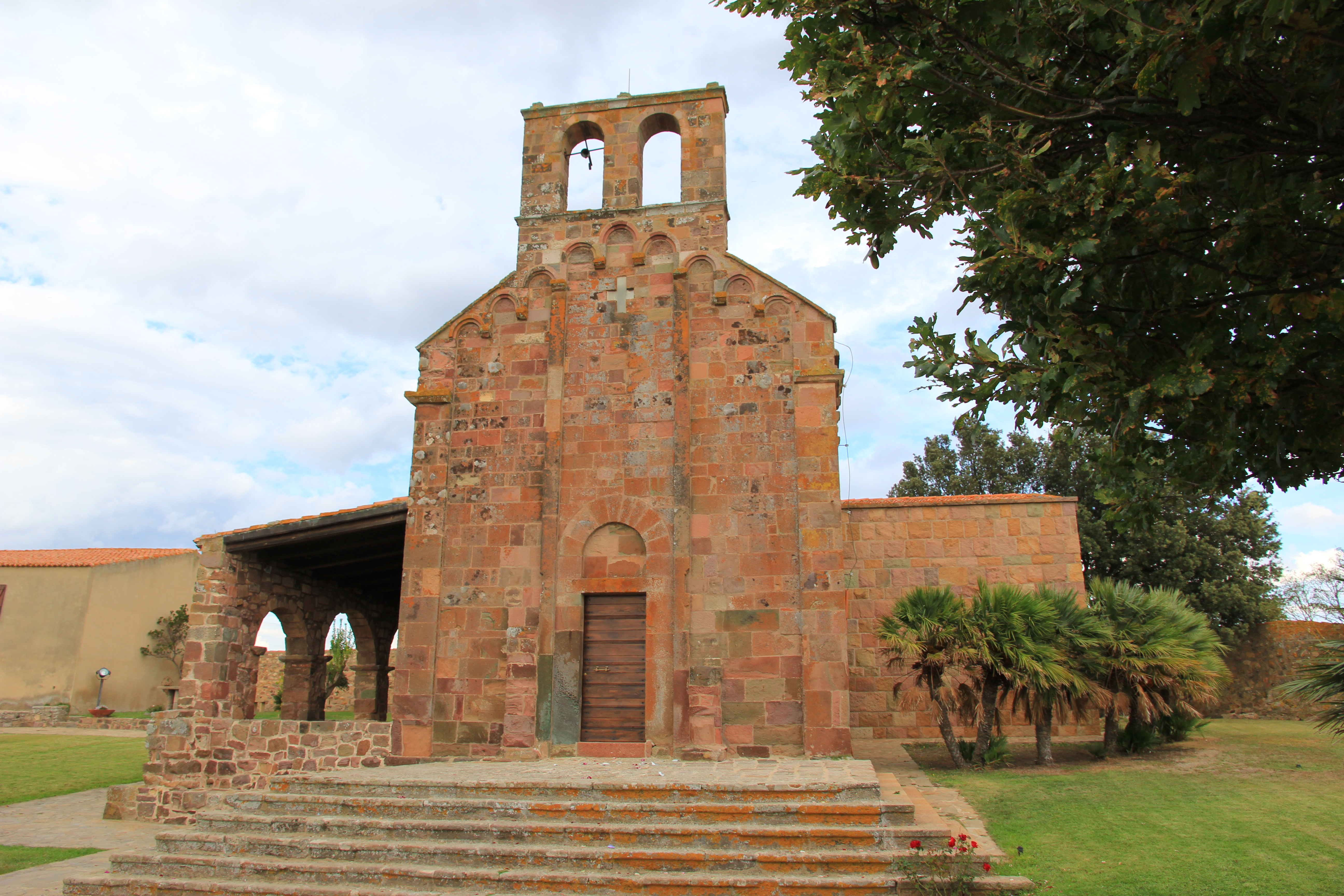 Oschiri - Santuario di Nostra Signora di Castro